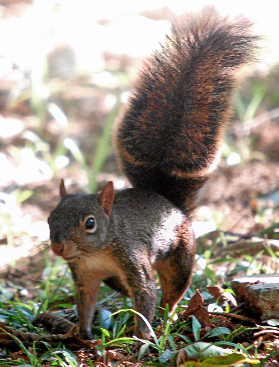 Sciurus aestuans, Esquilo Brasileiro